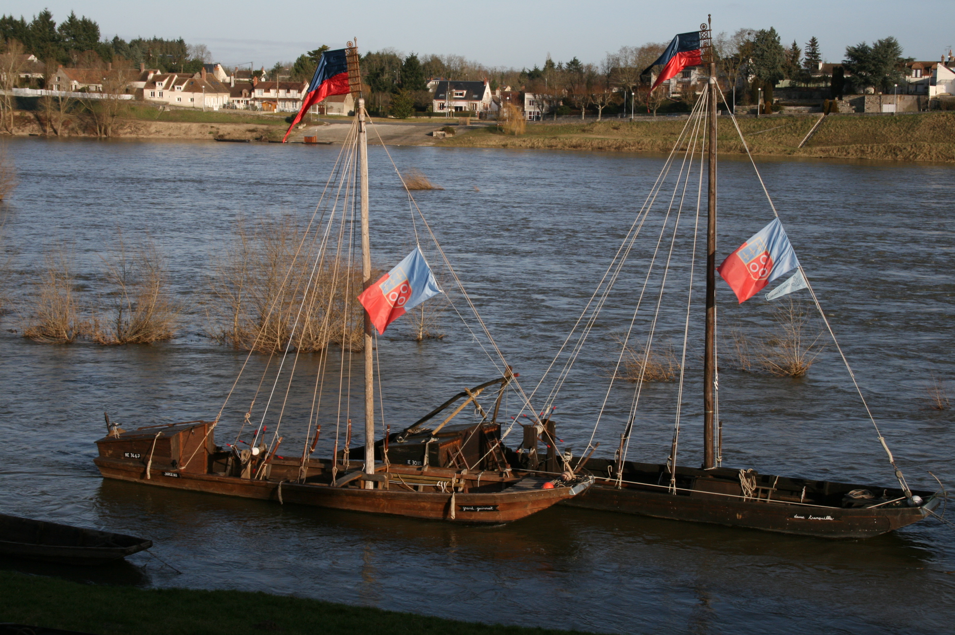 Bateaux de Loire, Jargeau (Loiret, France)